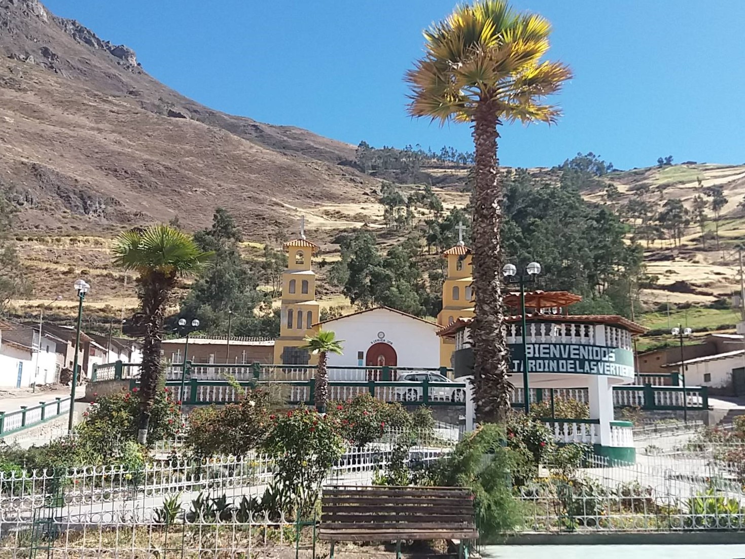 Plaza de Armas del distrito de Huacllán en la Provincia de Aija, Departamento de Áncash, Perú